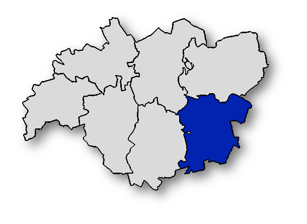 Powiat pułtuski z uwzględnieniem Gminy Zatory